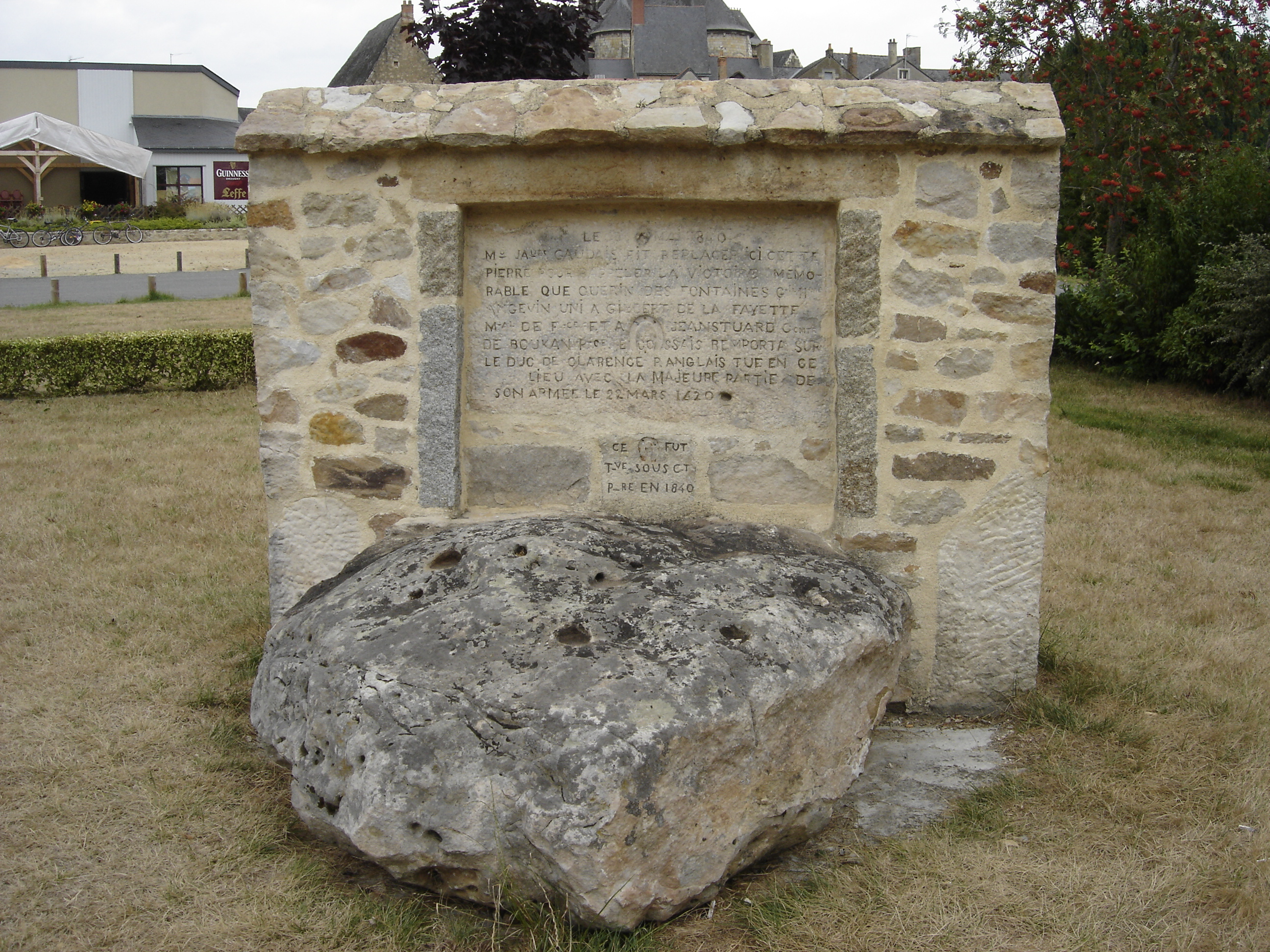 La Pierre de la Bataille du Vieil Baugé (Maine-et-Loire)